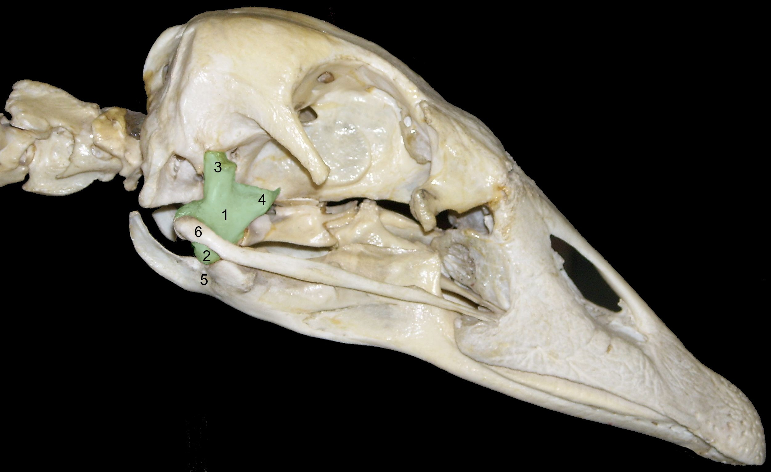 Quadratum of a domestic goose (coloured green), 1 Corpus quadrati, 2 Processus mandibularis quadrati, 3 Processus oticus quadrati, 4 Processus orbitalis quadrati, 5 Os articulare, 6 Os quadratojugale.